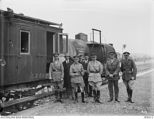 גנרל שובל וקציני מטה בתחנת הרכבת של חלב